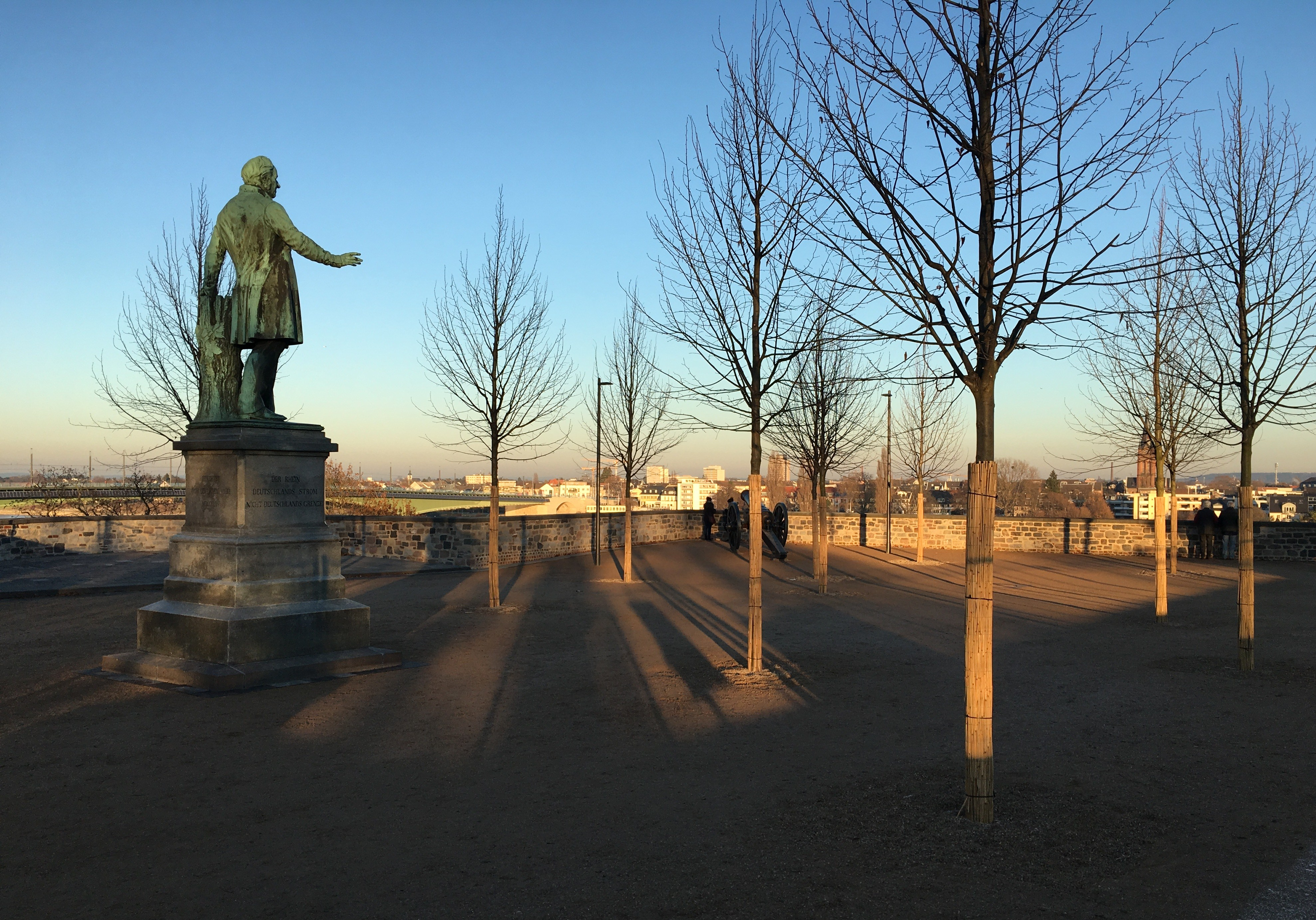 Deutschland, Bonn, Alter Zoll mit Ernst-Moritz-Arndt-Denkmal: Neugestaltung nach Sanierung des Gemäuers und des Untergrundes. Der bisherige Baumbestand war geschädigt und wurde durch neue Pflanzen (Linden) ersetzt; moderne Laternen wurden aufgestellt.